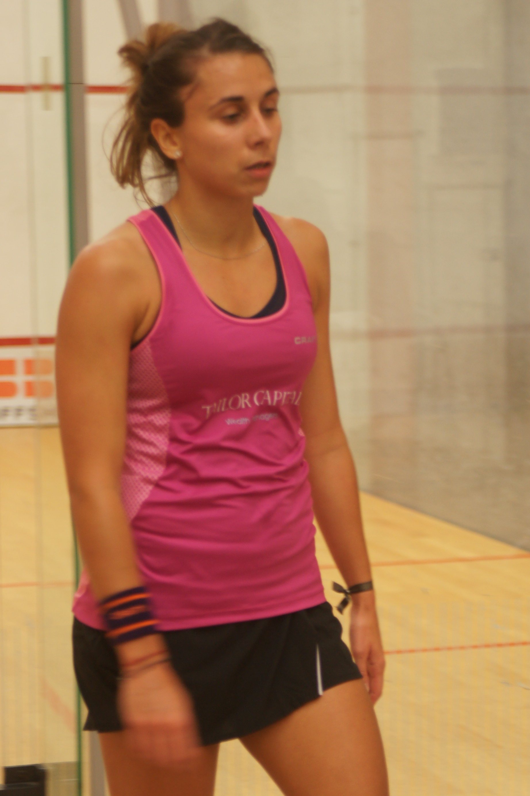 Laura Pomportes, Monaco Squash classic 2016